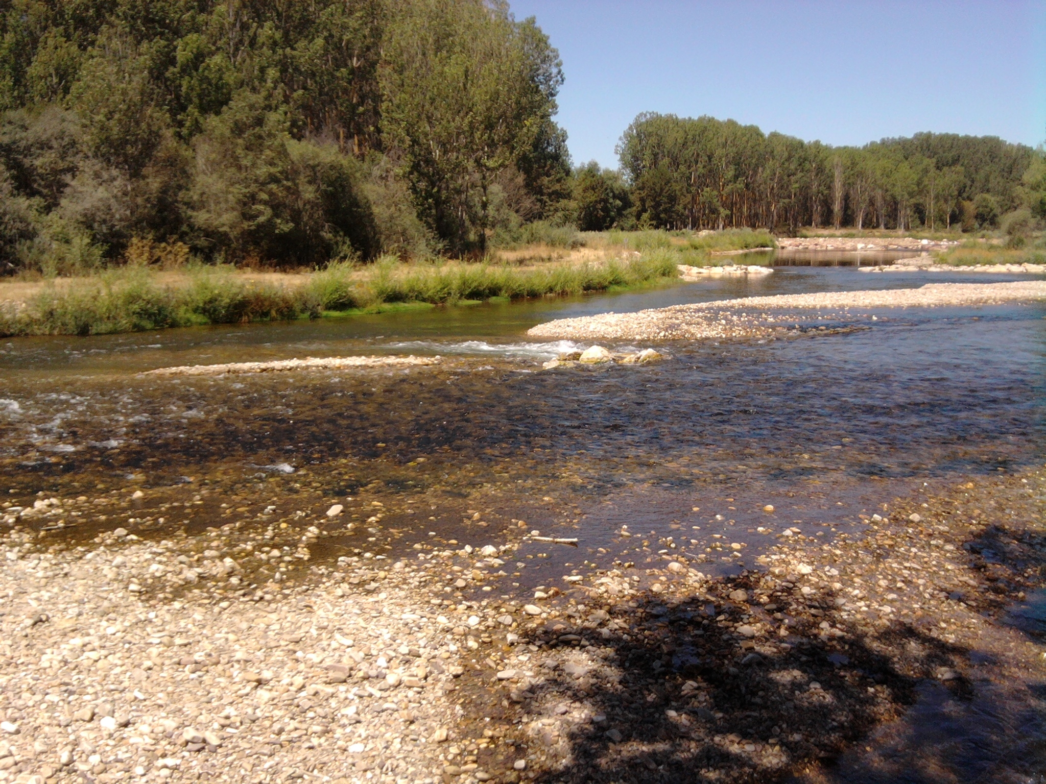 Nacimiento del Río Órbigo como unión de los Ríos Luna y Omaña. (Birth of Orbigo River)